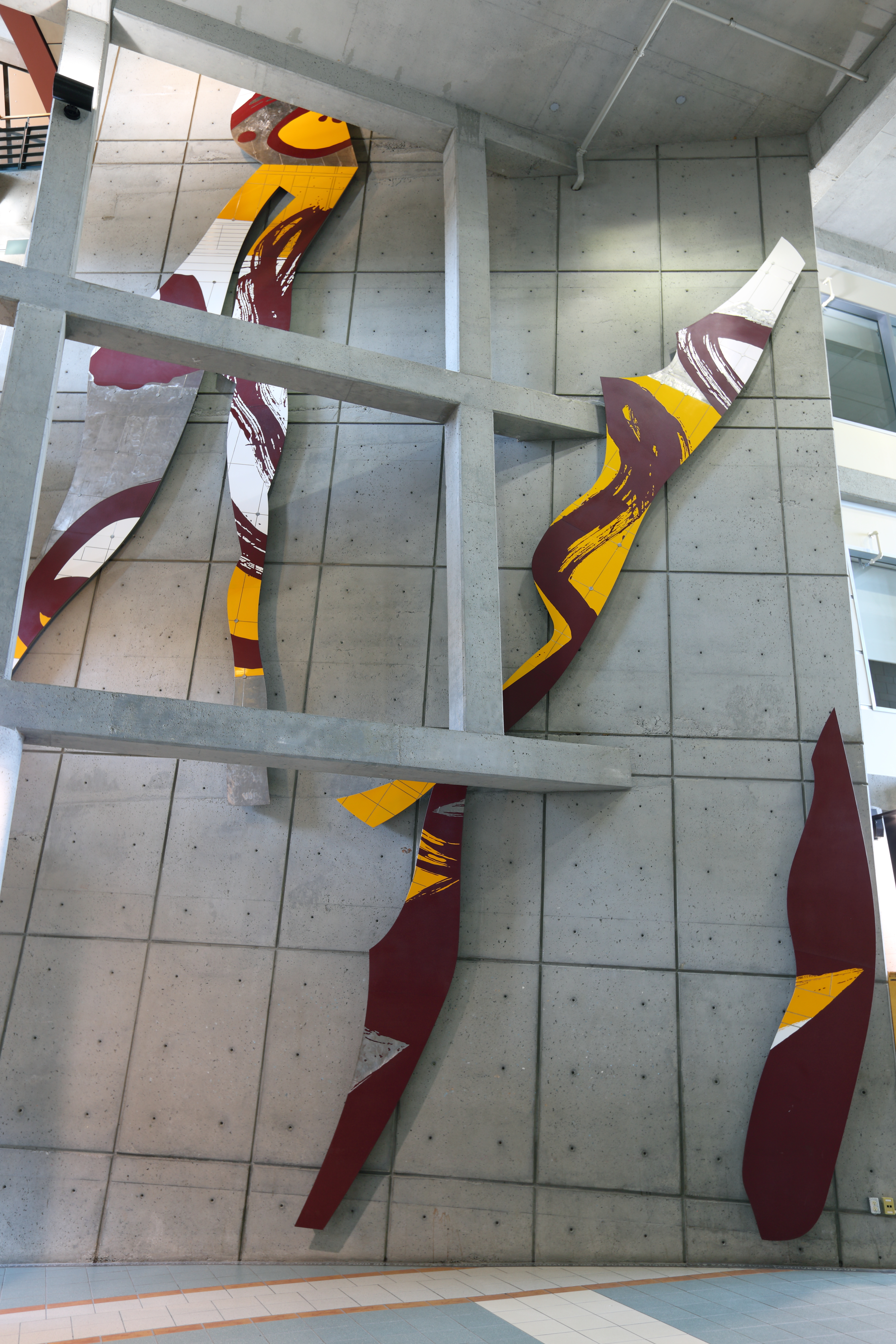 La sculpture illustre un extrait du poème « Le bateau ivre » écrit en 1871 par l'auteur français Arthur Rimbaud. Cet extrait a été choisi pour illustrer les notions de force, de déséquilibre et de mouvance exprimés par l'immensité du lieu : la vastitude du passage, l'atrium couronné d'une série d'ouvertures vitrées, le mur penché dans lequel viennent butter les structures des étages. Cet ensemble architectural donne l'impression d'être face à la coque d'un bateau à la dérive: le bateau ivre. Cet extrait fait aussi appel à l'intemporalité de l'art: un lien entre le passé et le futur qui suggère la continuité et la reconnaissance du vécu humain par le moyen de l'expression créatrice. Les formes organiques rappellent celles des éclairs et dynamisent la surface du mur à la pinceaux font référence au travail de la main de l'artiste. La trame des circuits électroniques (mur de béton) répond à l'ossature de l'architecture.